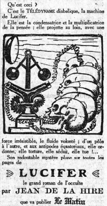 Encart publicitaire présent dans le journal Le Matin du 20/11/1921 p.2 qui annonce la prochaine parution de Lucifer de Jean de La Hire. Représentation du Télédyname, une invention permettant d'exercer un contrôle mental sur les individus.